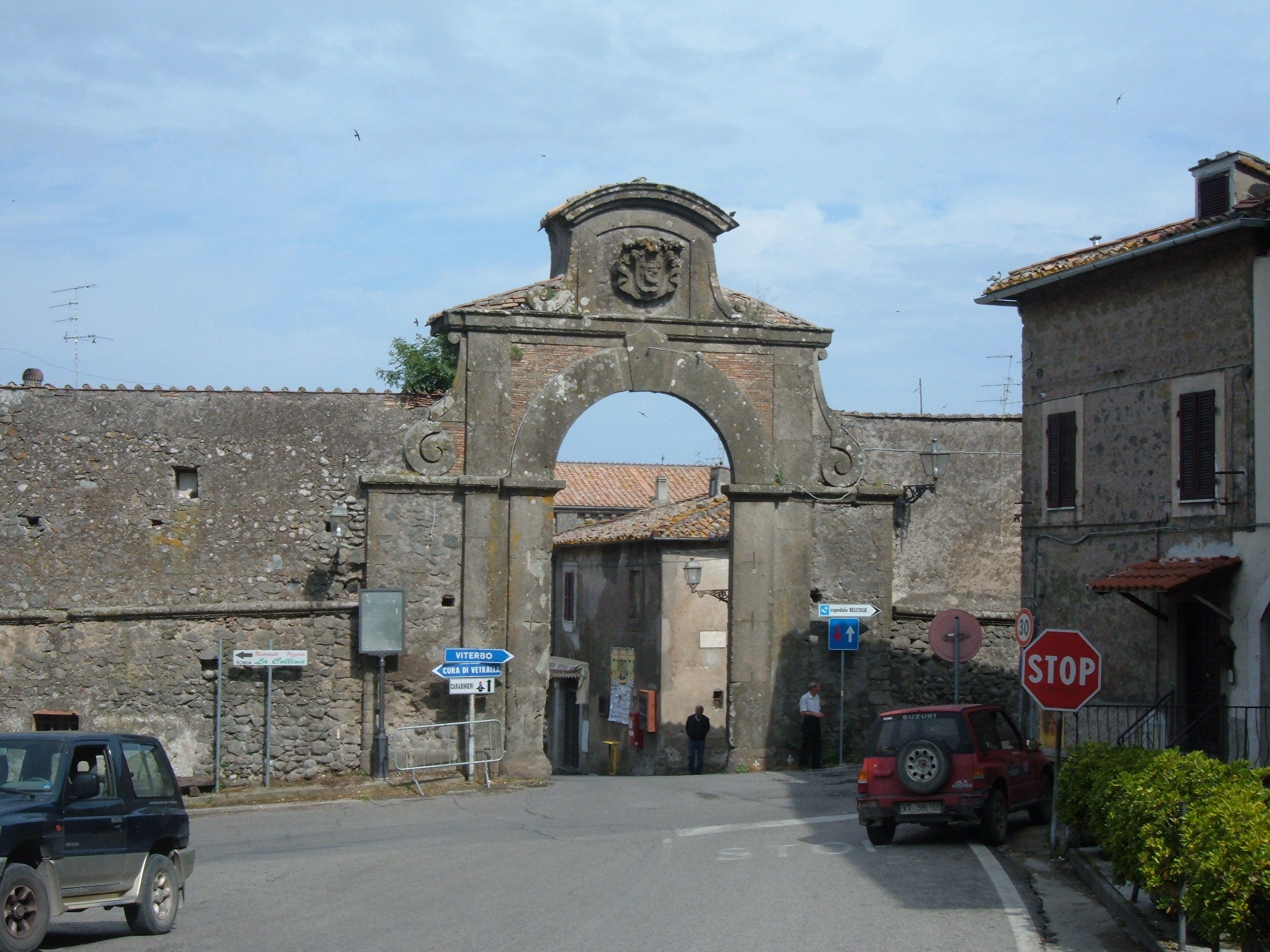 Ingresso al paese di San Martino al Cimino